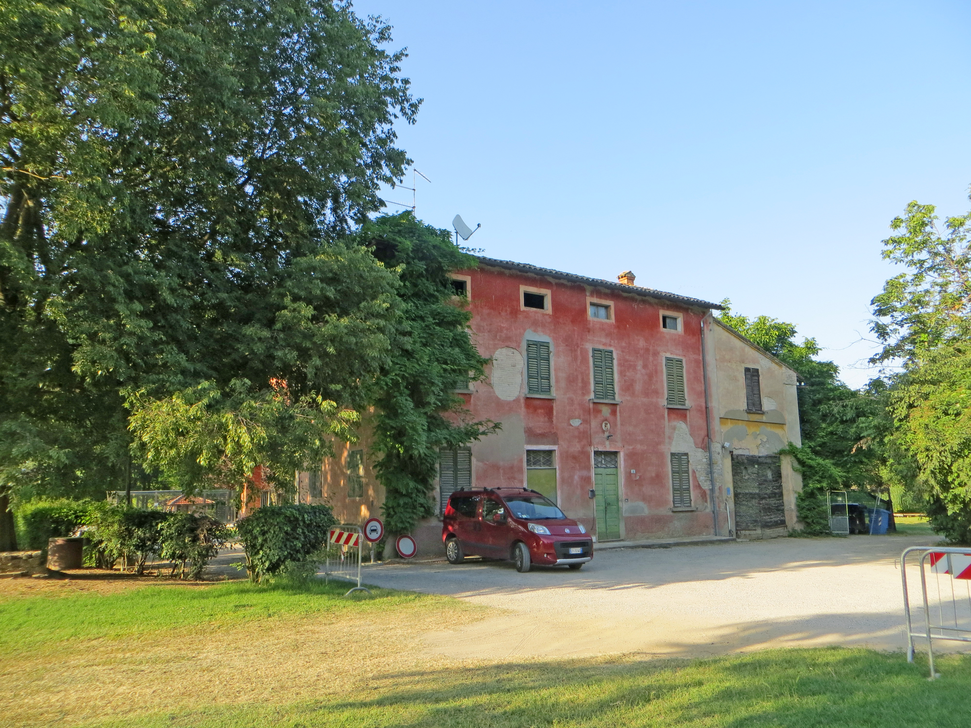 Villa Soragna (Collecchio) - edifici rustici del parco Nevicati